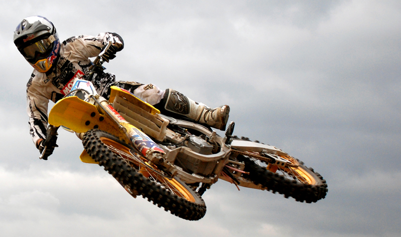 Motocross Jump